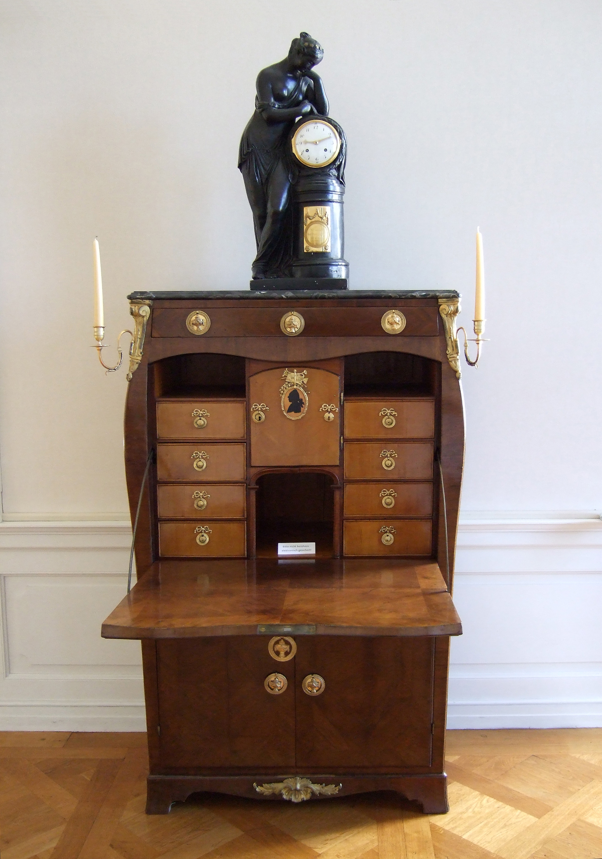 Sekretär im Zopfstil, Schloss Friedrichsfelde (Standort des Stadtmuseums Berlin)